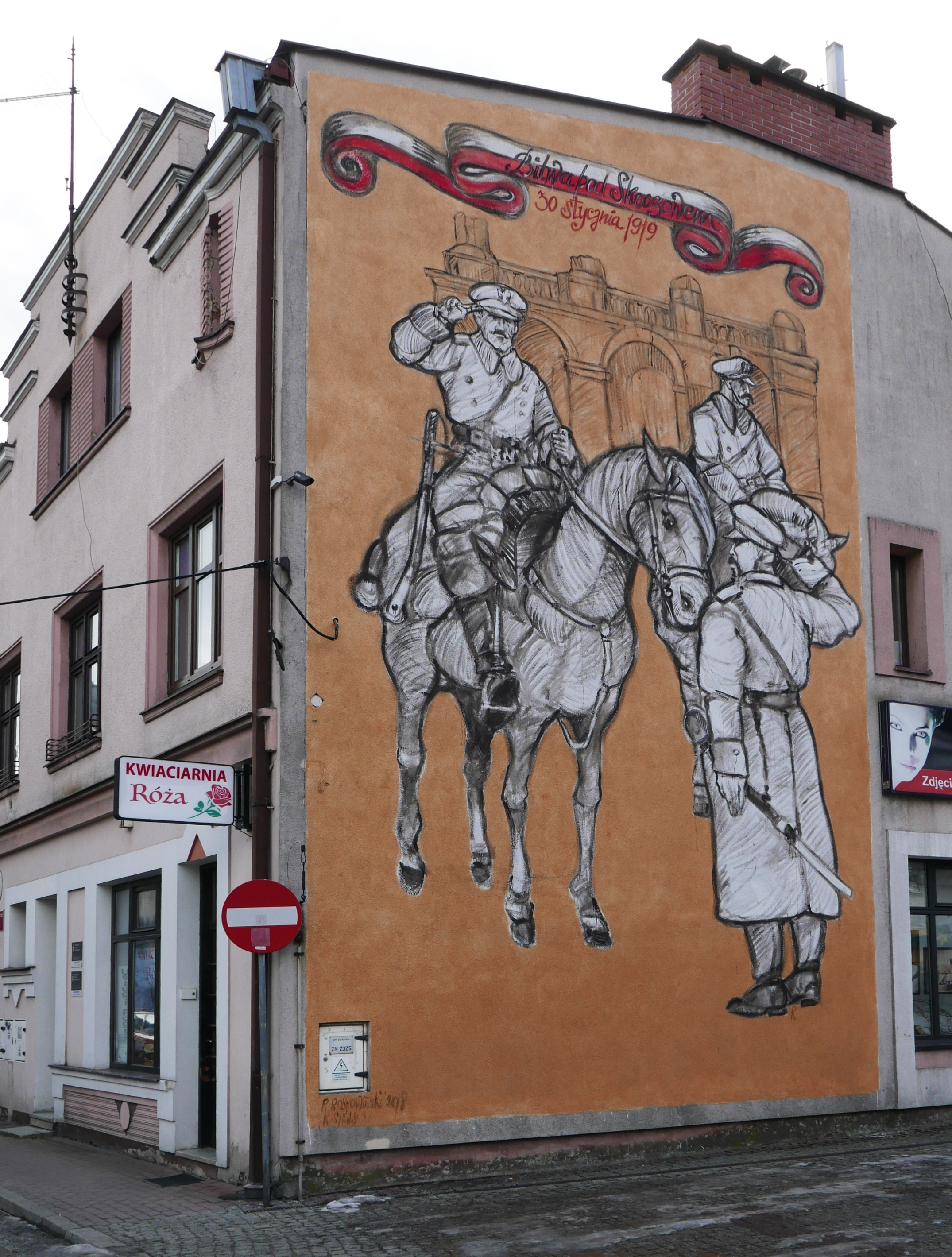 Mural Bitwa pod Skoczowem 30 stycznia 1919 na budynku przy ul. Wałowej, na tzw. Małym Rynku. Przestawia on 3 oficerów, w tle prezentuje się grób nieznanego żołnierza. Twórcą dzieła jest Rafał Roskowiński, doktor sztuk pięknych, założyciel Gdańskiej Szkoły Muralu.